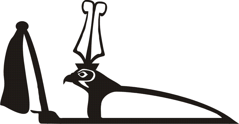 Hieroglyphenzeichen für den ägypt. Gott Soped